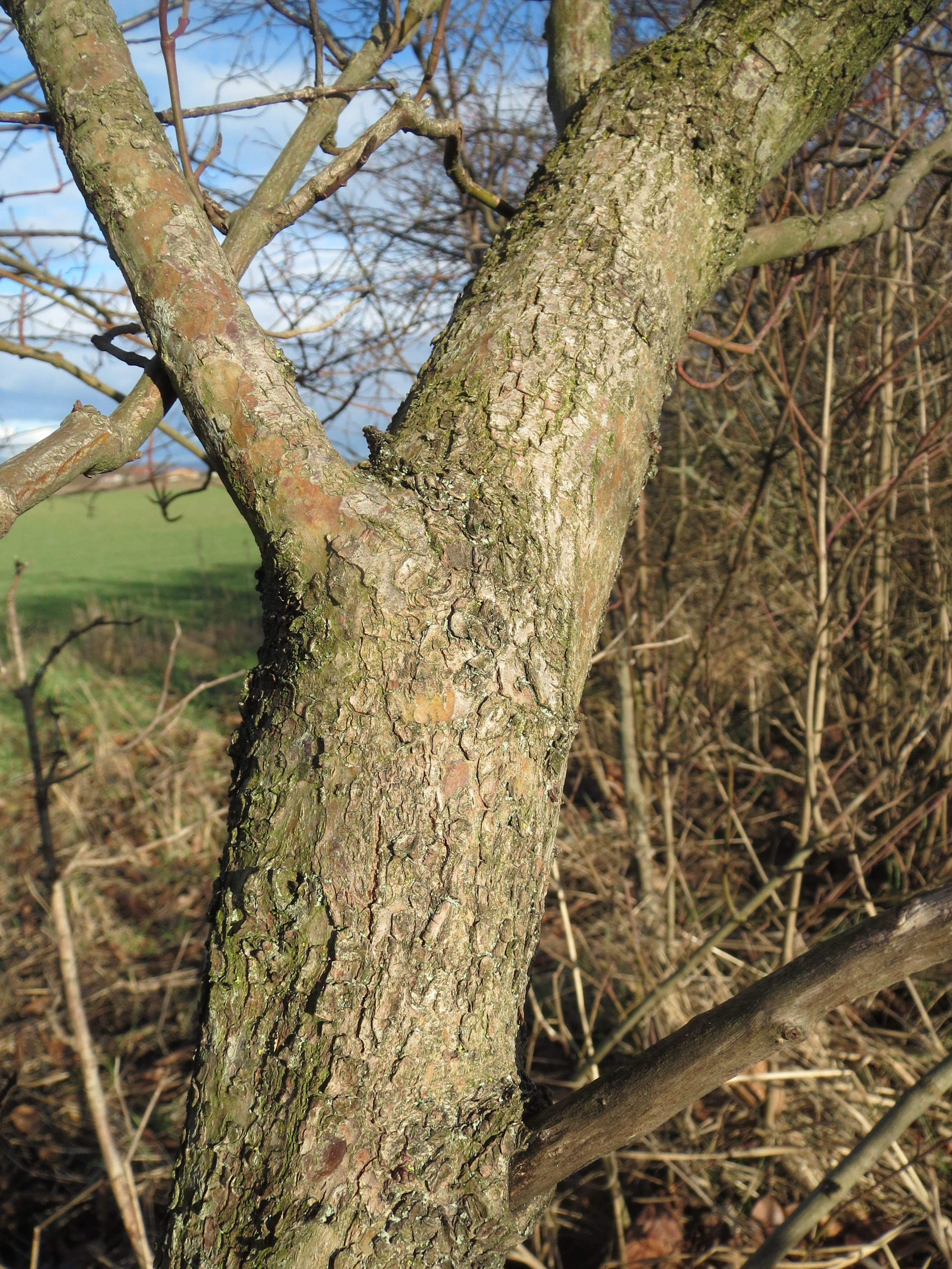 Hartriegel (Cornus sanguinea) bei Neulußheim